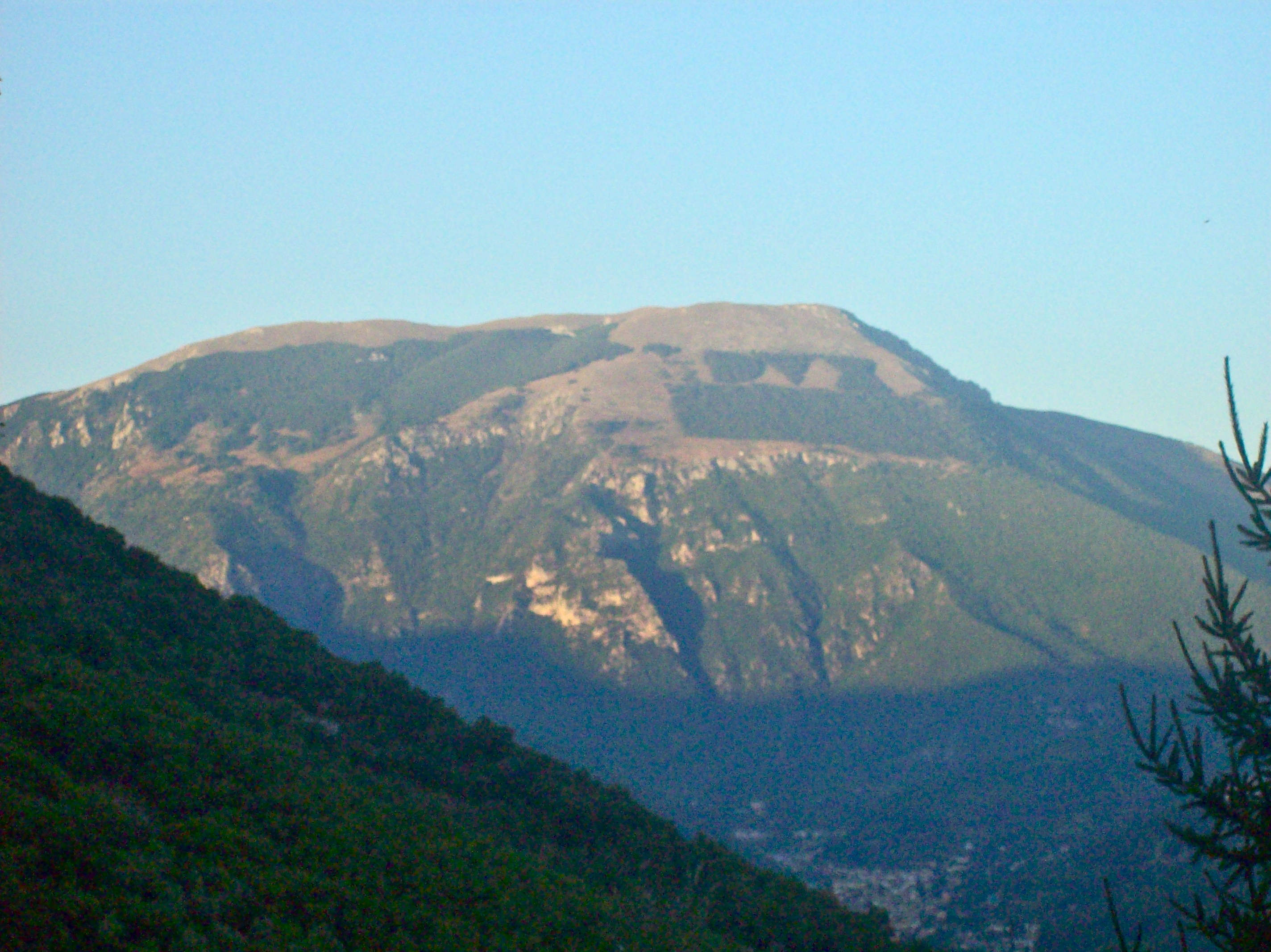 Gruppo montuoso di Monte Giano, Appennino centrale, presso il confine tra Lazio e Abruzzo e lo spartiacque appenninico. Sul versante ovest è visibile la scritta "DVX" come omaggio a Benito Mussolini, composta da alberi di pino durante il periodo fascista.